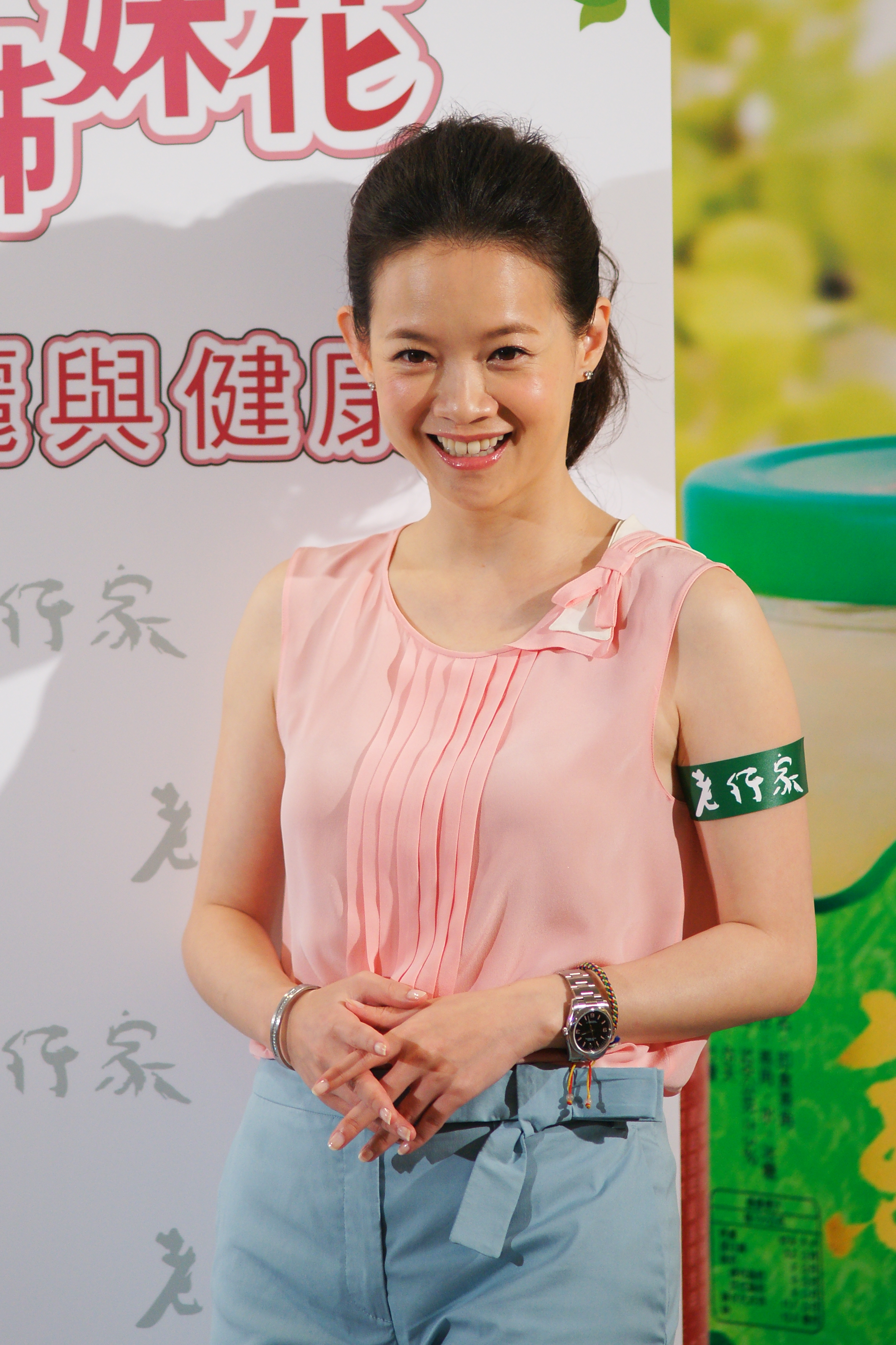 曾寶儀出席老行家母親節新品活動。